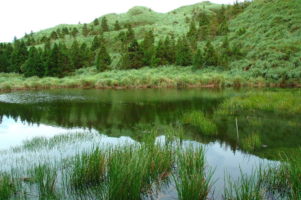 臺灣臺北市陽明山國家公園的夢幻湖。